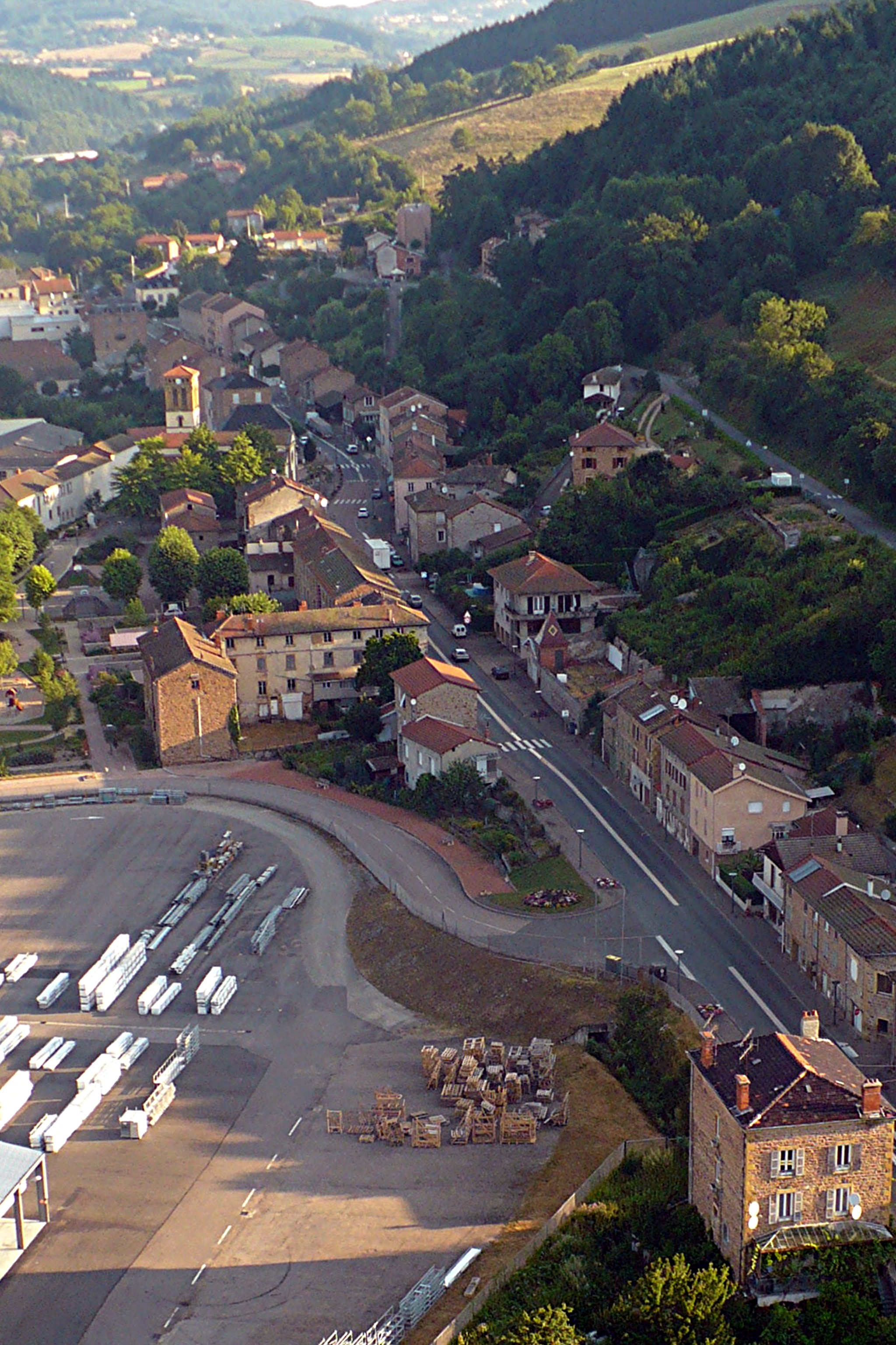 pont trambouze vue de montgolfière